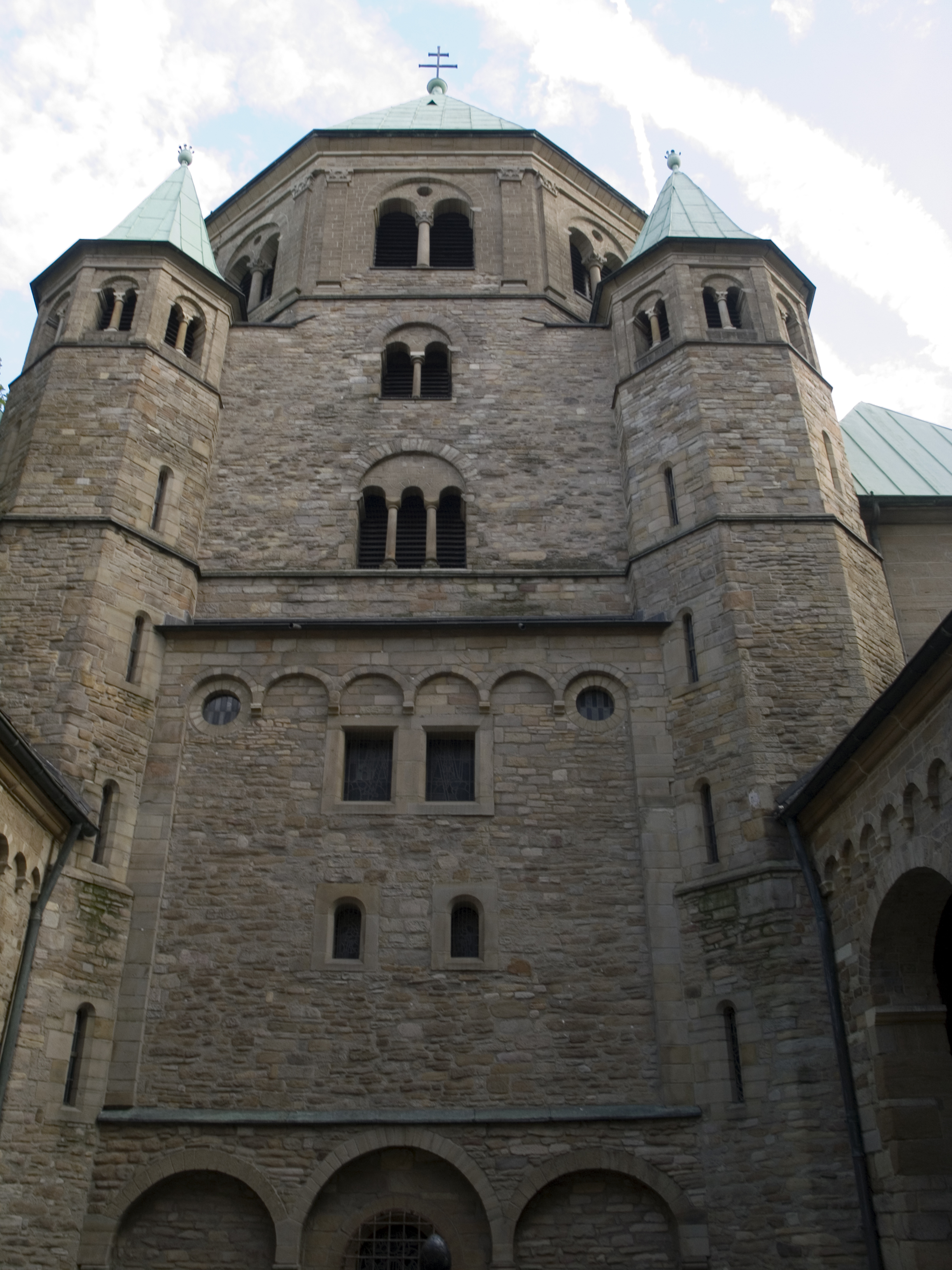 Северный Рейн - Вестфалия, Эссен - Эссенский собор